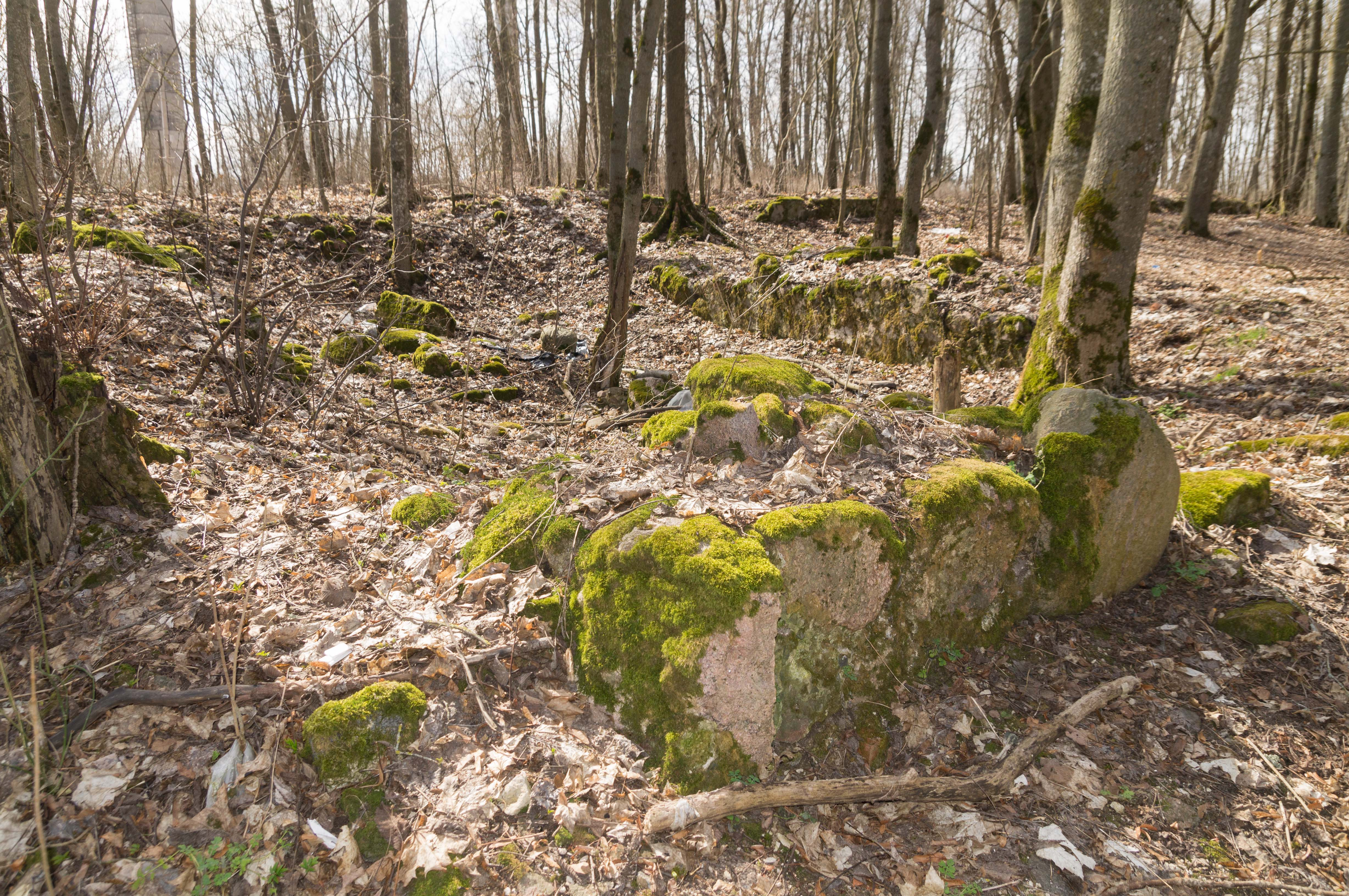 Чурлёны. Рэшткі падмурку былога маёнтка